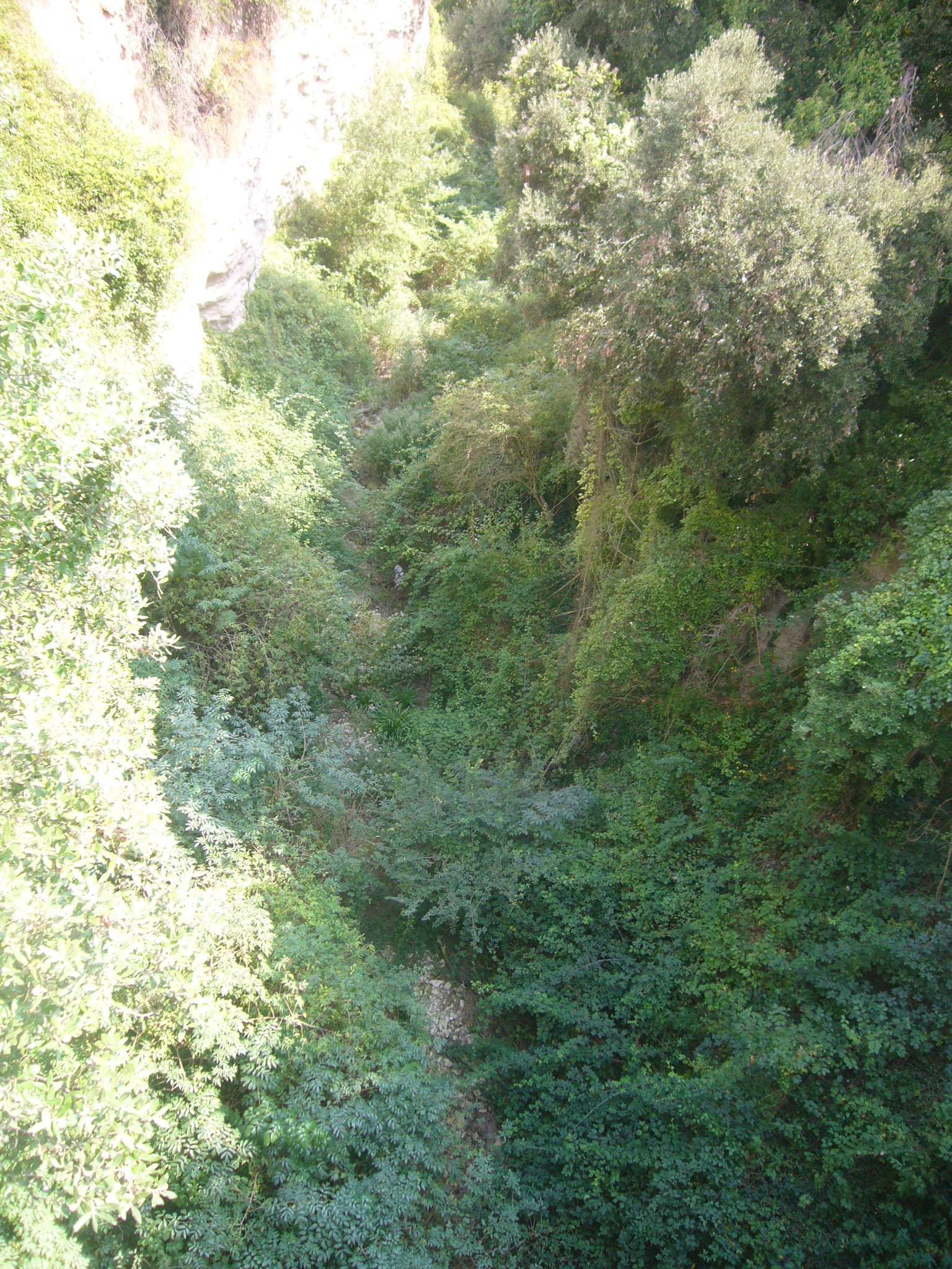 Riera de Clariana, sota el pont situat davant el poble de Clariana (municipi d'Argençola)